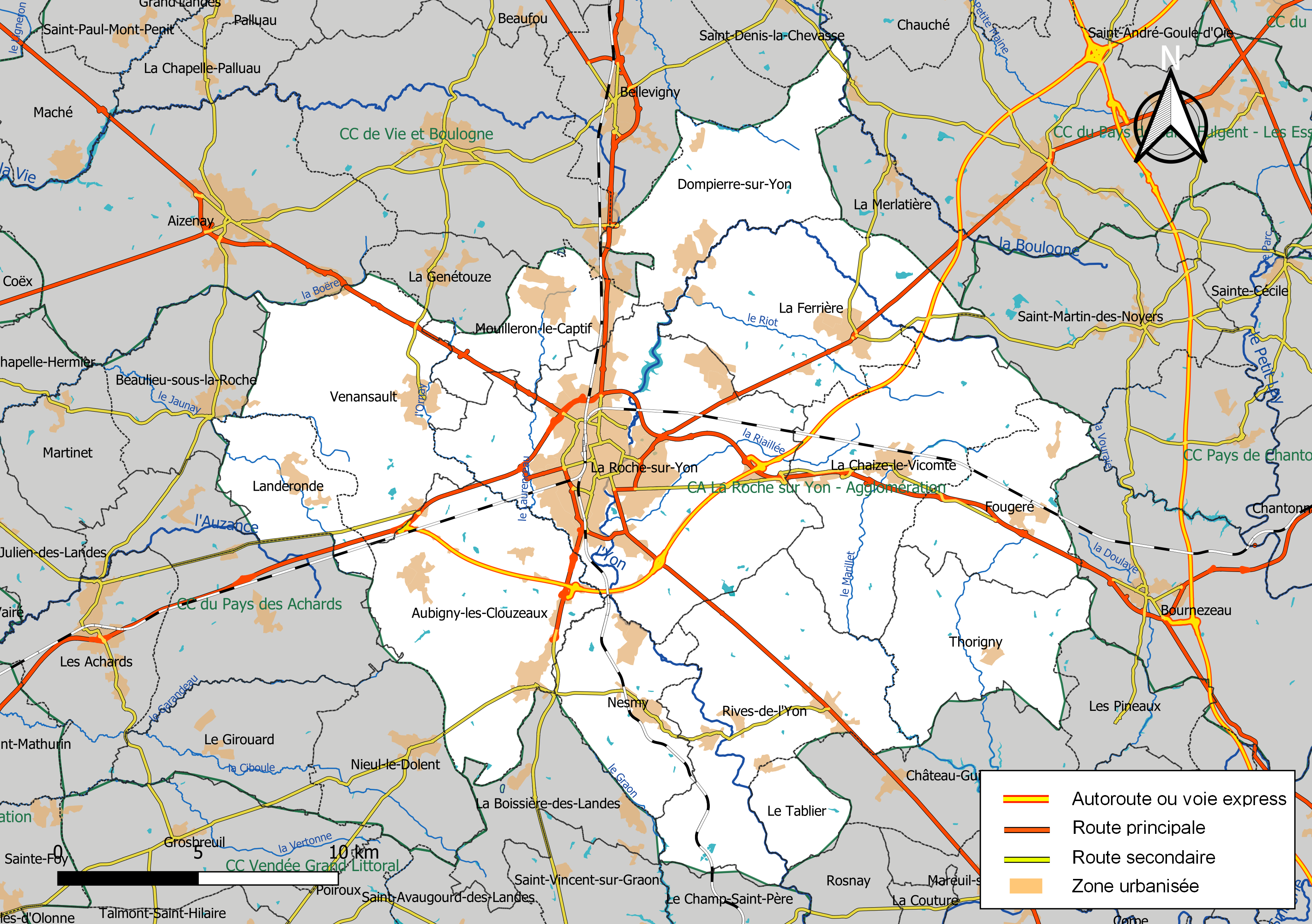 Carte géographique de l'intercommunalité La Roche-sur-Yon-Agglomération, département de la Vendée, France. Composition au 1er janvier 2019.